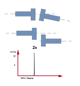 Gaizki lerrokatzean bibrazioen analisian agertzen den espektroa